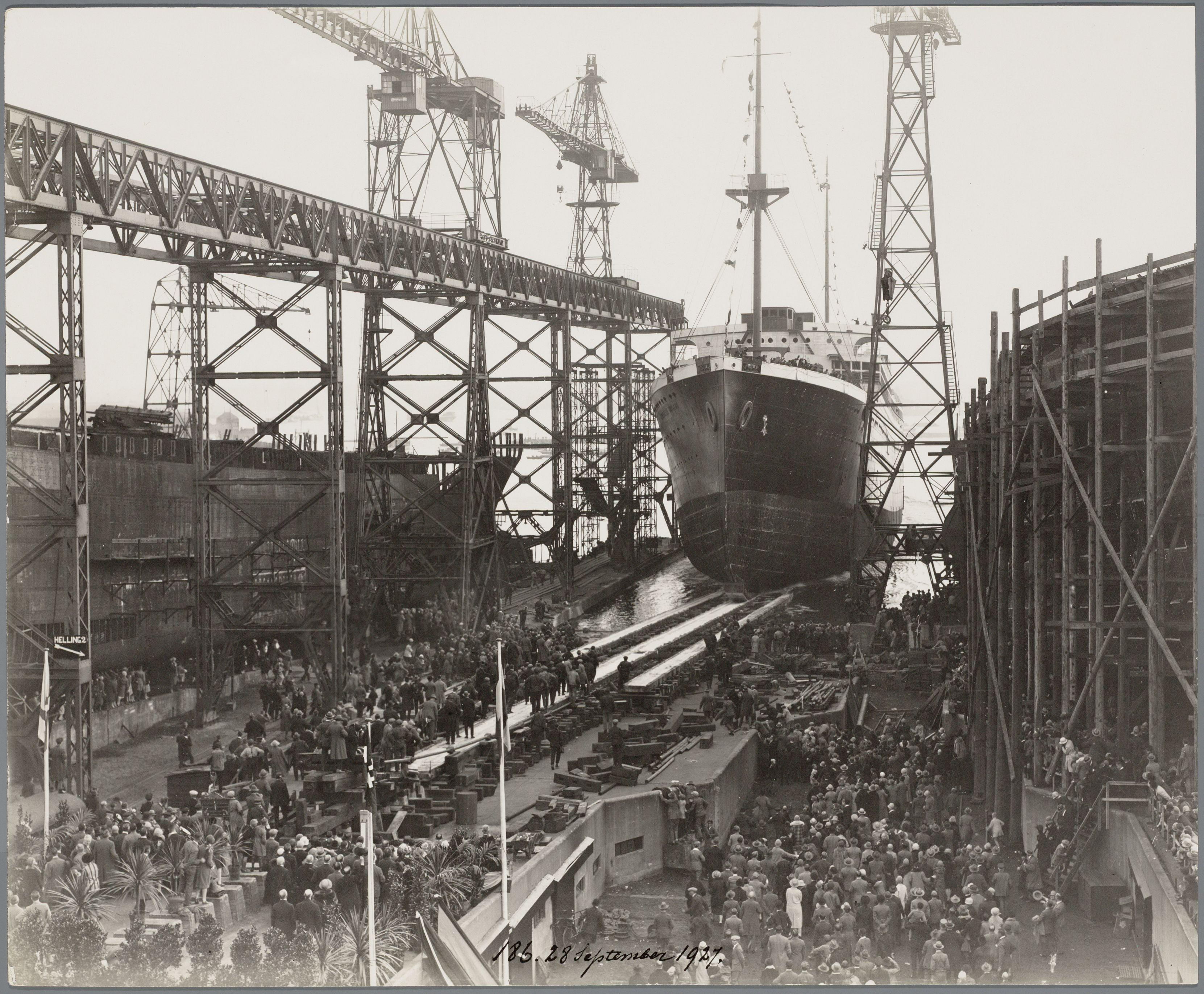 Beschrijving Stapelloop van het mailschip ms. Christiaan Huygens Bouwnummer186, gebouwd op de werf van de Nederlandsche Scheepsbouw Maatschappij (N.S.M.), Cornelis Douwesweg 1, in opdracht van de Stoomvaart Maatschappij Nederland. Tijdens de Tweede Wereldoorlog werd het schip door de geallieerden als troepentransportschip ingezet. In de zomer van 1945 werd het in Antwerpen gereviseerd. Op weg naar Rotterdam echter, liep het in het Steendiep op een mijn; zwaar beschadigd werd het op de Steenbank gezet om zinken te voorkomen. Op 5 september 1945 brak het schip (op 51.37 noorderbreedte en 3.17 oosterlengte) en werden verdere bergingspogingen gestaakt. Documenttype foto Vervaardiger Oosterhuis, Gustaaf (1858-1938) Collectie Archief Nederlandse Dok- en Scheepsbouw Mij.: foto's Datering 28 september 1927 Geografische naam IJ Cornelis Douwesweg Inventarissen Afbeeldingsbestand 010179000337 Generated with Dememorixer